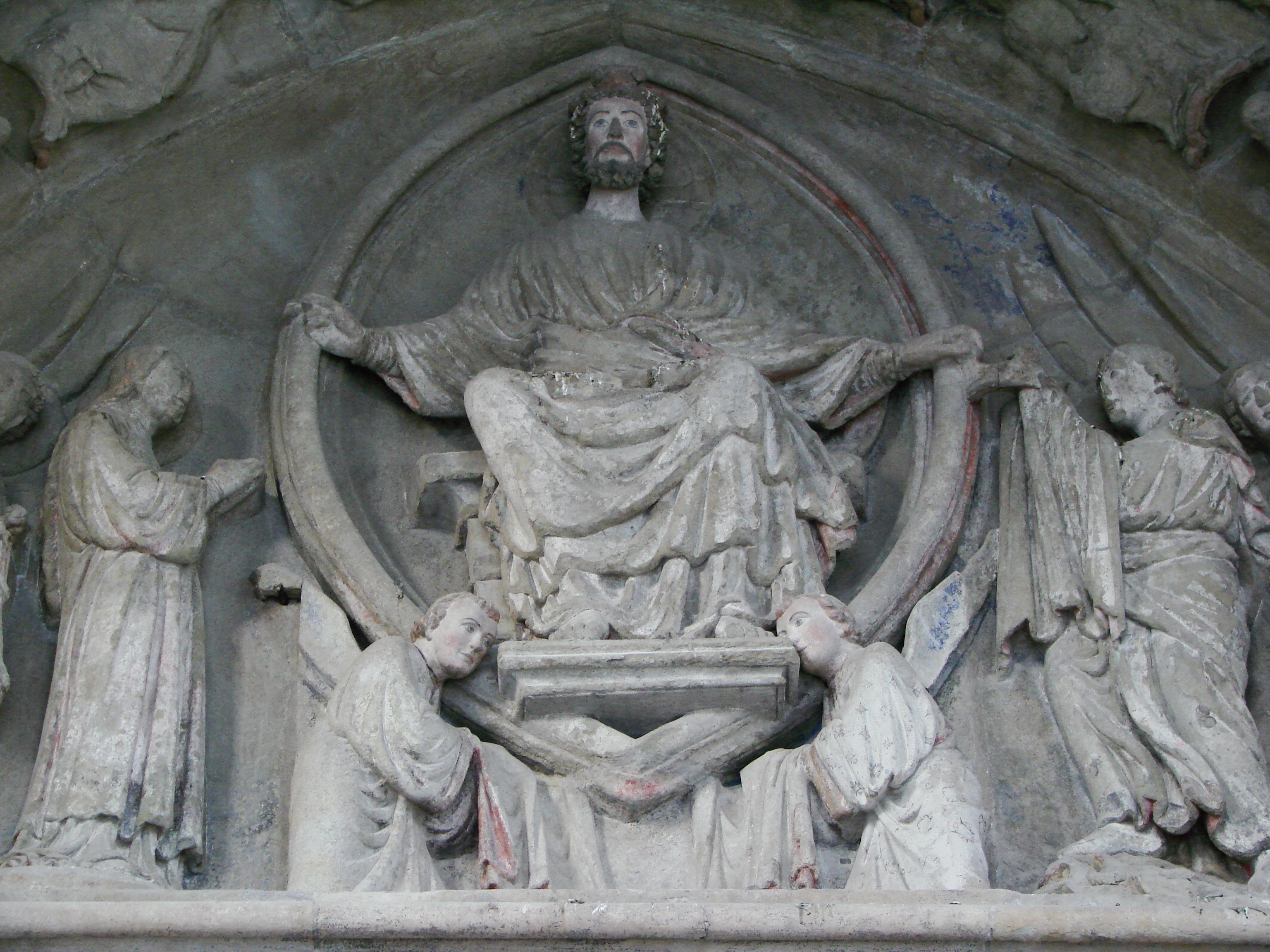 Cathédrale de Lausanne, ville de Lausanne (Suisse) : portail peint de l'entrée latérale de la cathédrale, restauré en 2007.